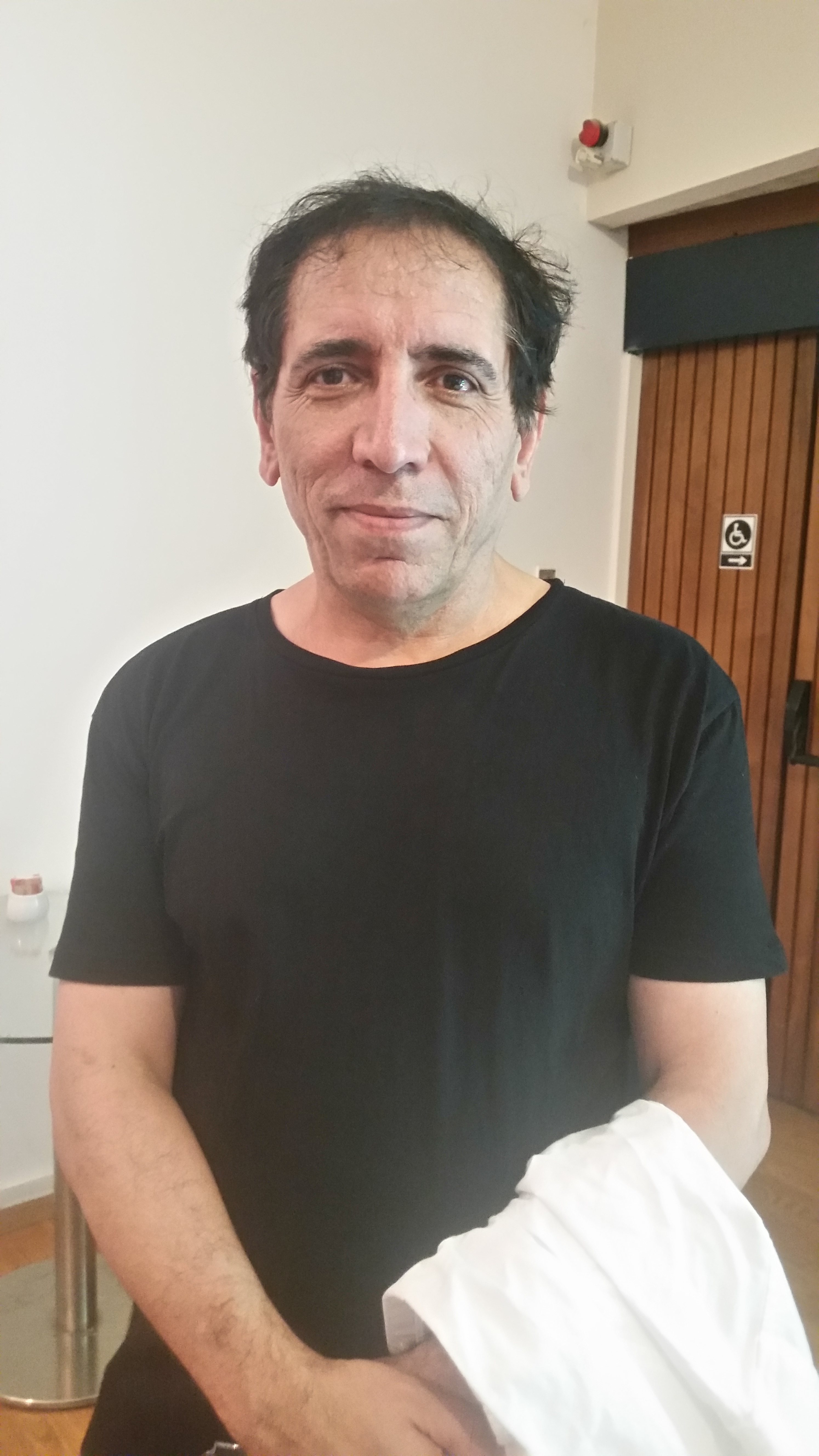 מוחסן מחמלבאף בפסטיבל הסרטים הבינלאומי בחיפה ה-31 בו הוקרן סרטו הקצר "הדייר" וסרט עליו ועל משפחתו "בית הספר של אבא"